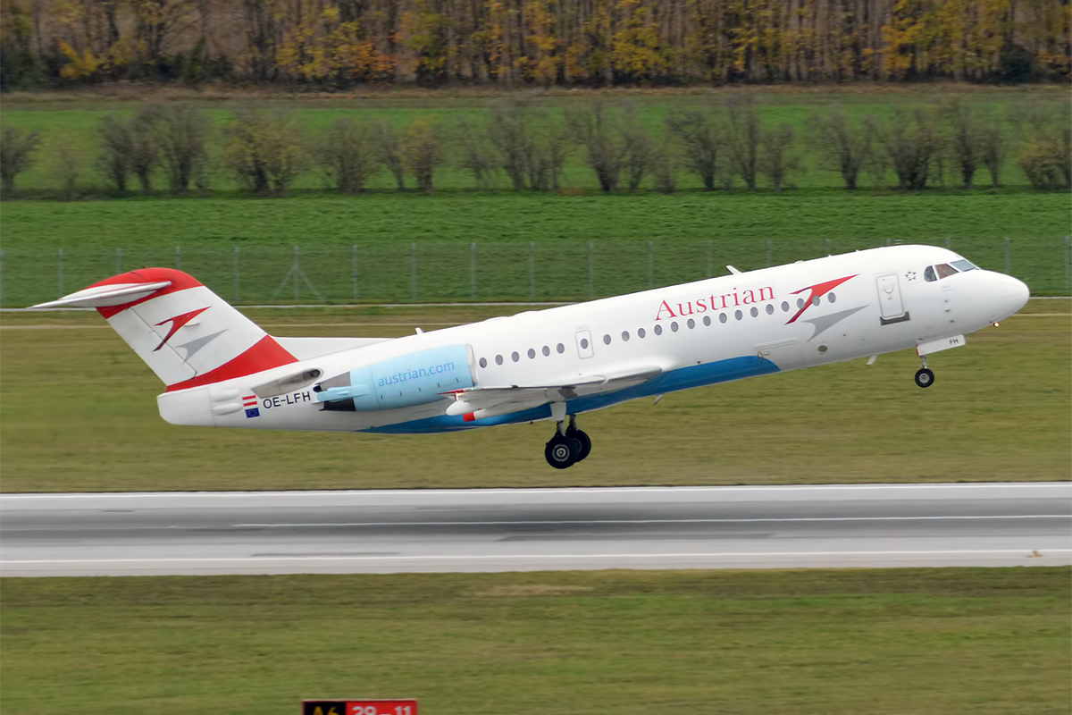 Austrian Airlines, OE-LFH, Fokker F70